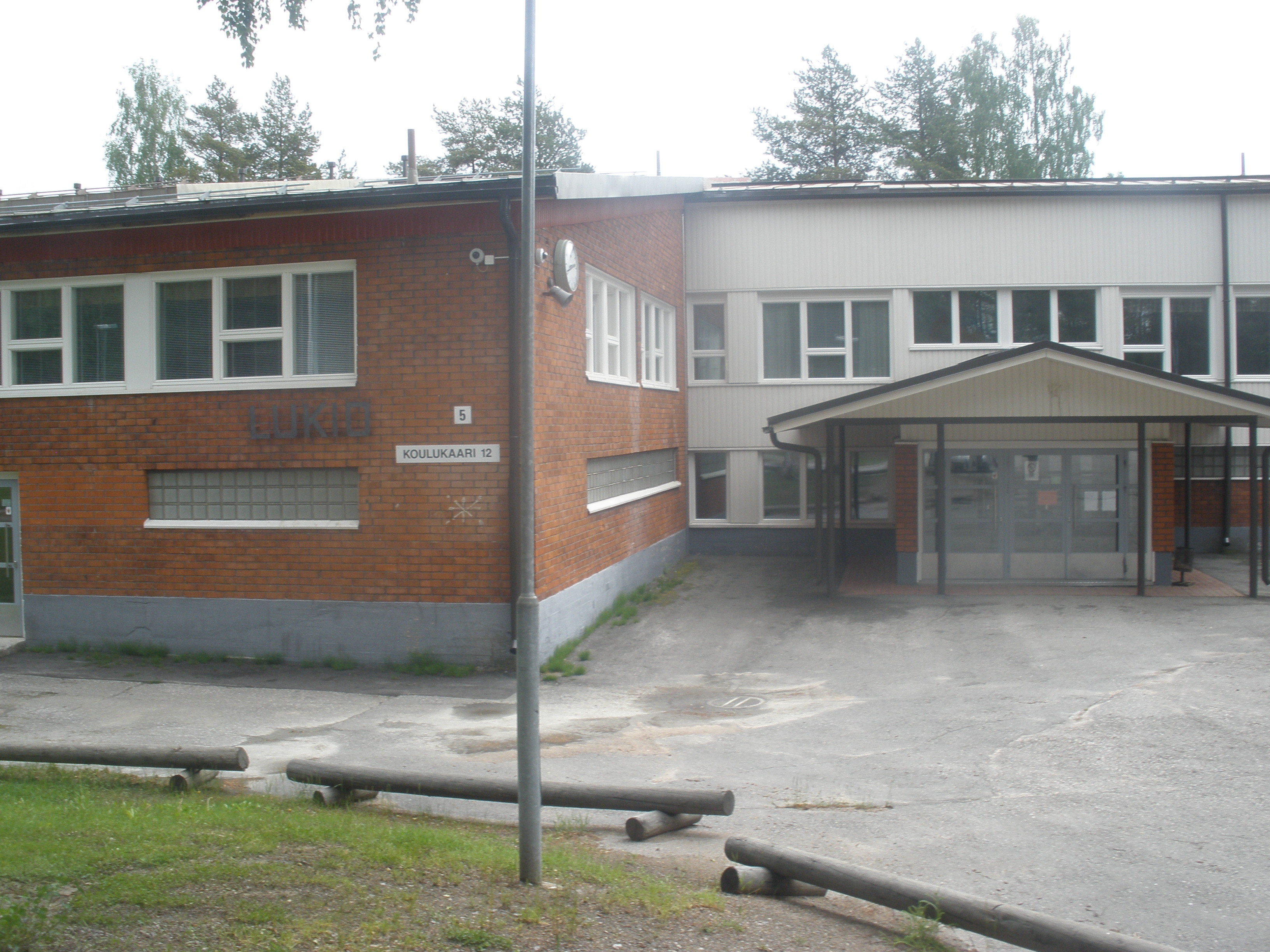 Muurolan lukio Rovaniemellä kesäkuussa 2012.